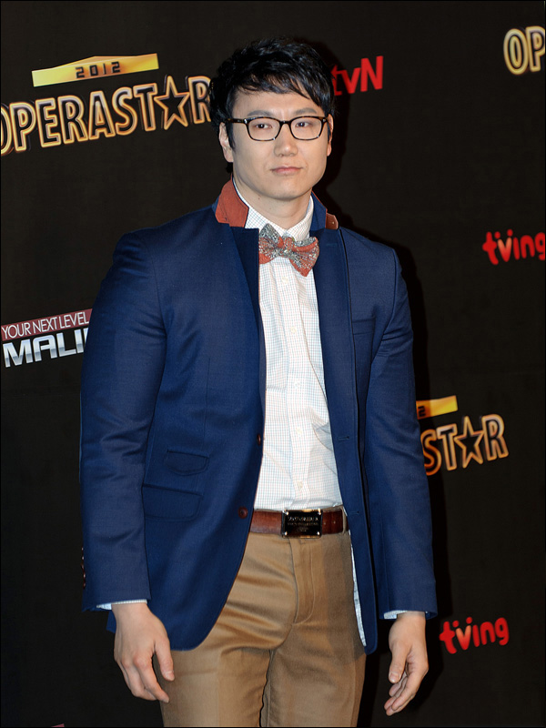 tvN 오페라스타 2012 제작 발표회에 참여한 더원